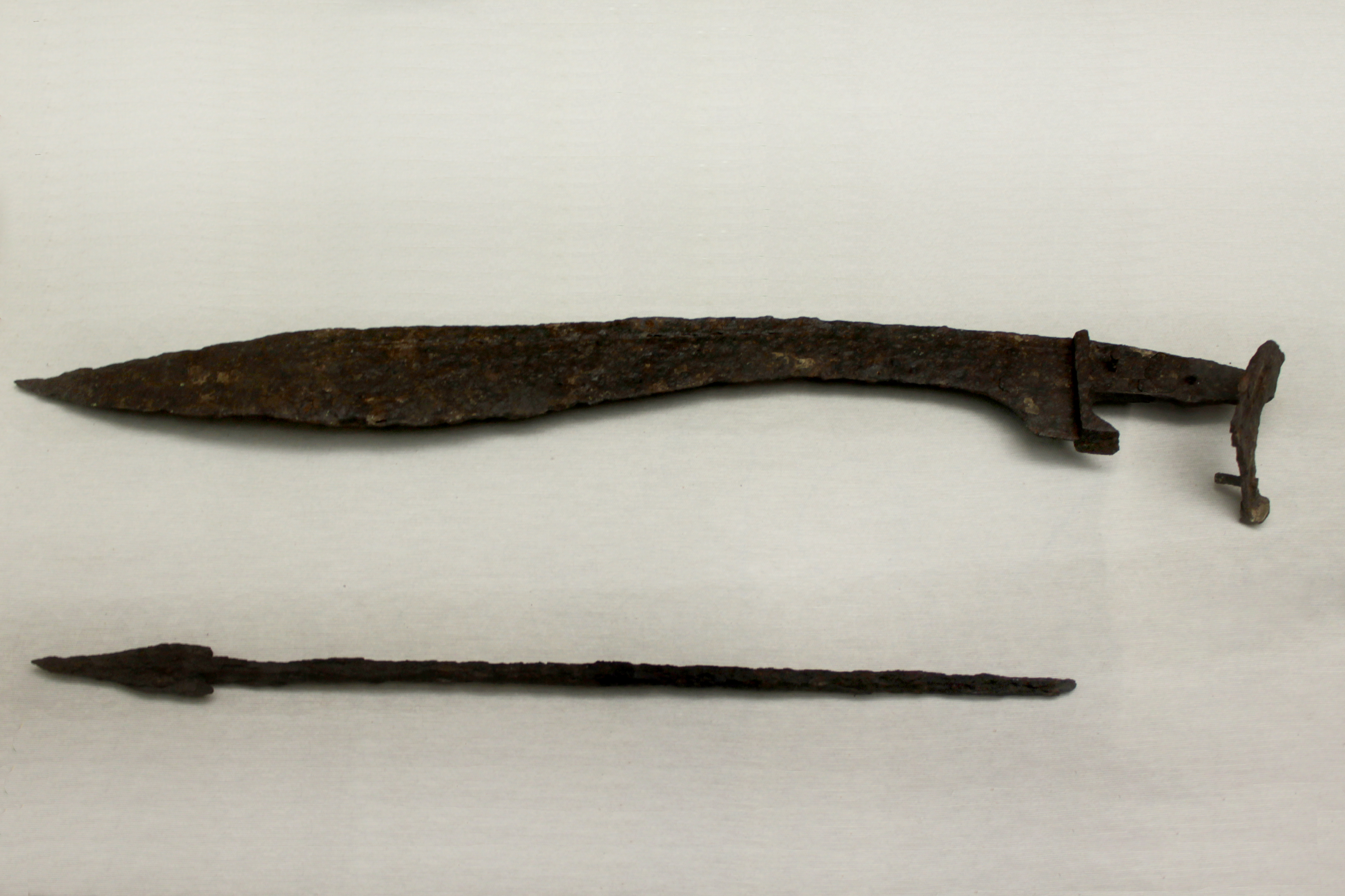 Falcata y Soliferreum del yacimiento de Bastida de Les Alcusses de Moixent. Depositadas en el Museo de prehistoria de Valencia, Comunidad valenciana, España.